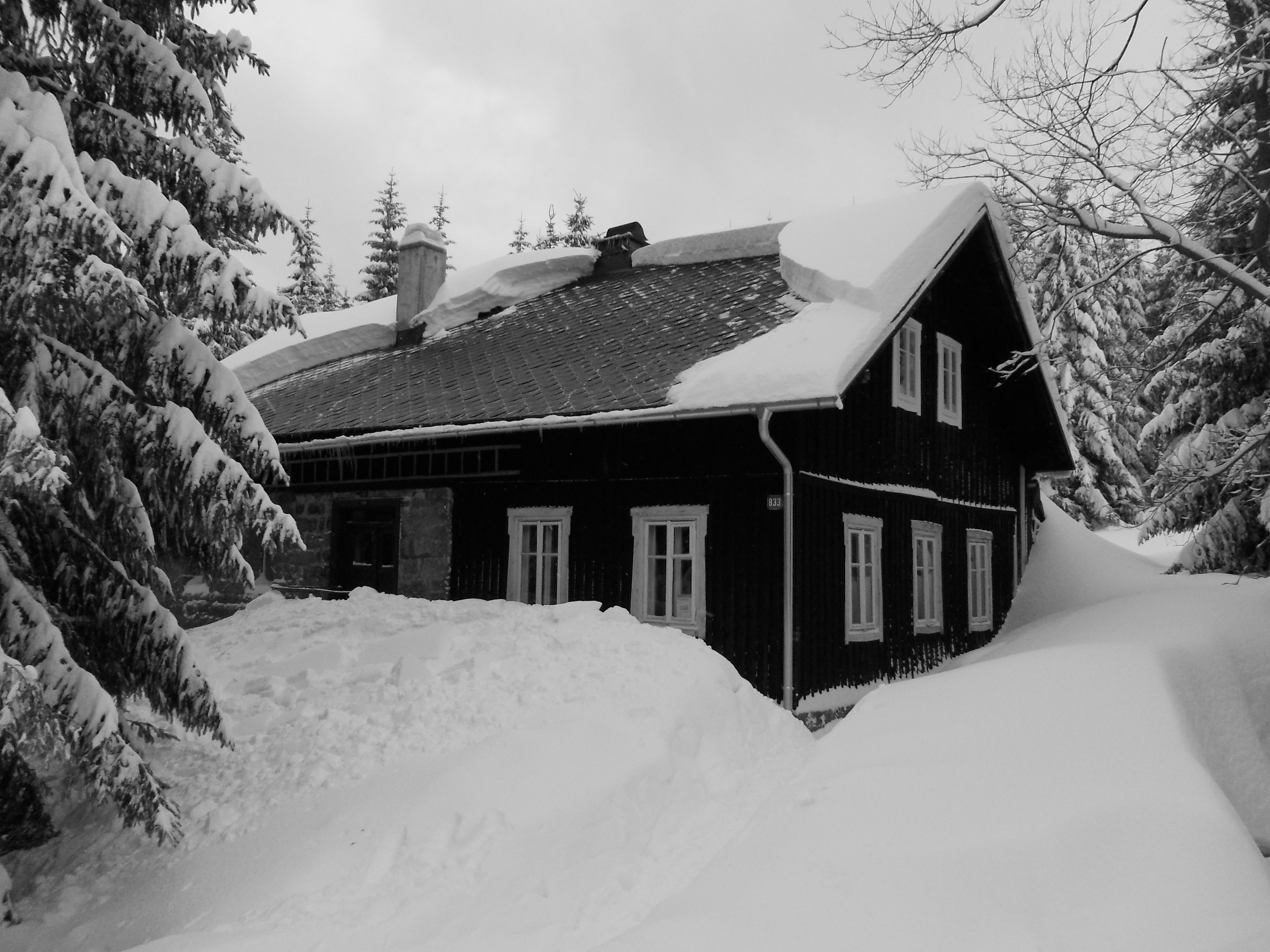 Mariánskohorské boudy, ev.č. 833